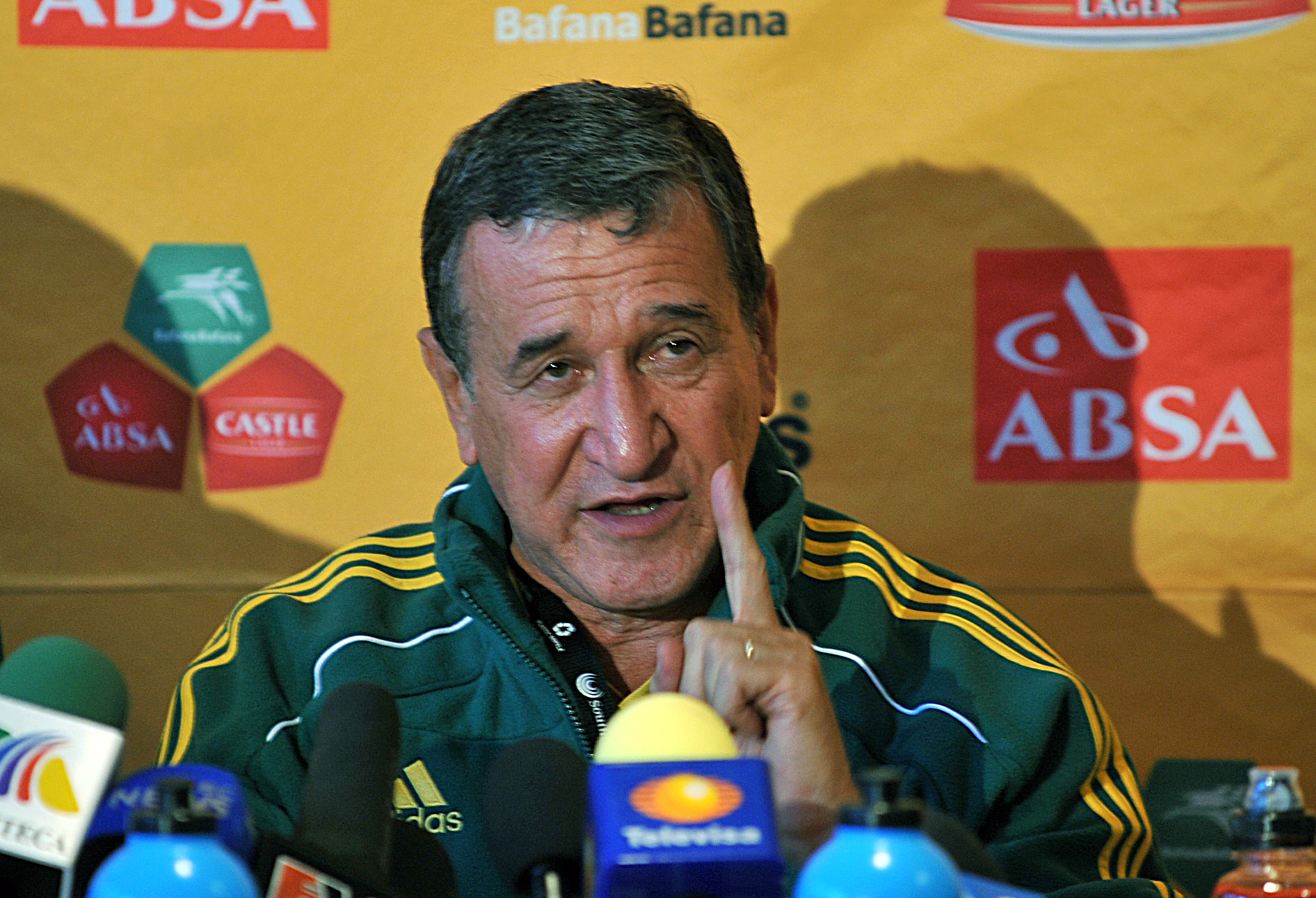 Johannesburgo (África do Sul) - O treinador da África do Sul (Bafana Bafana), o brasileiro Carlos Alberto Parreira, concede entrevista à imprensa, após treino da seleção na Universidade de Witwatersand.